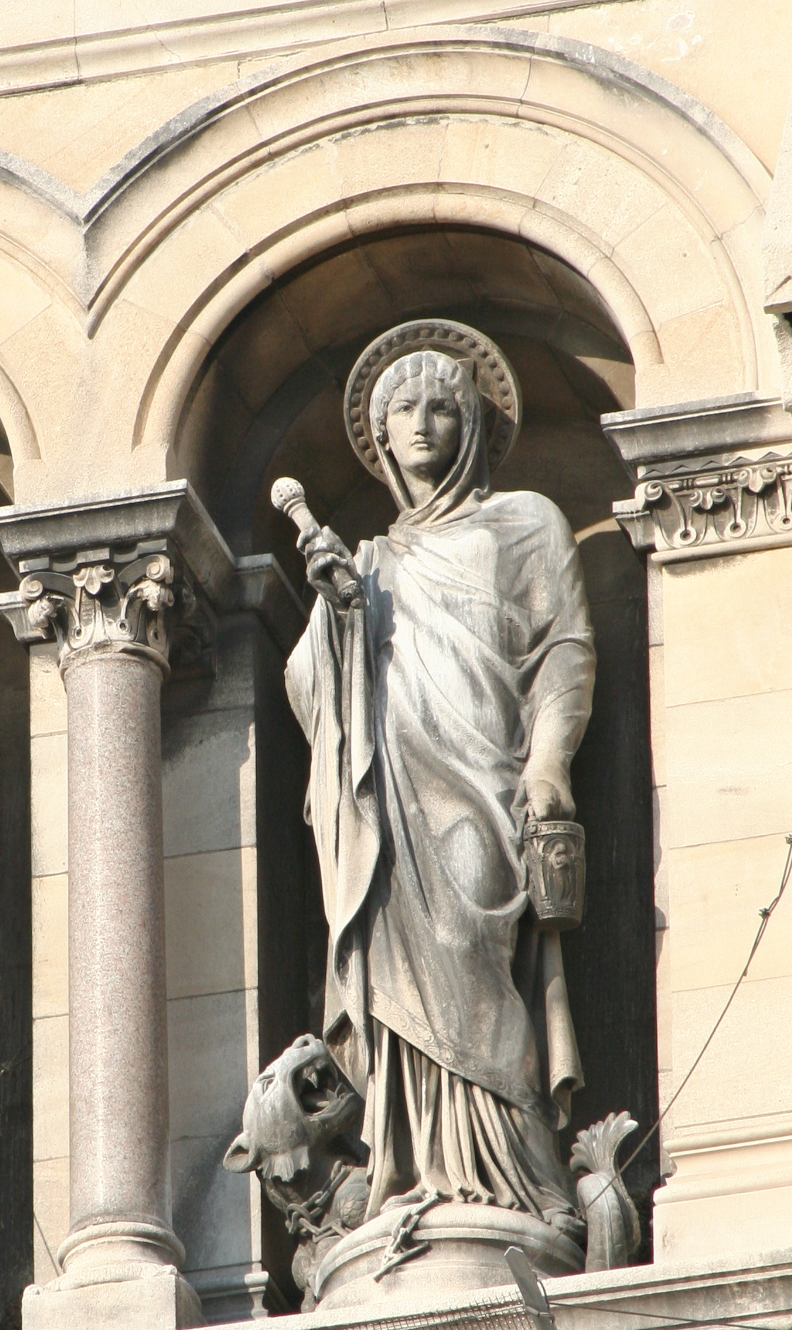 Statue de Sainte Marthe, sur la façade de la Cathédrale La Major à Marseille